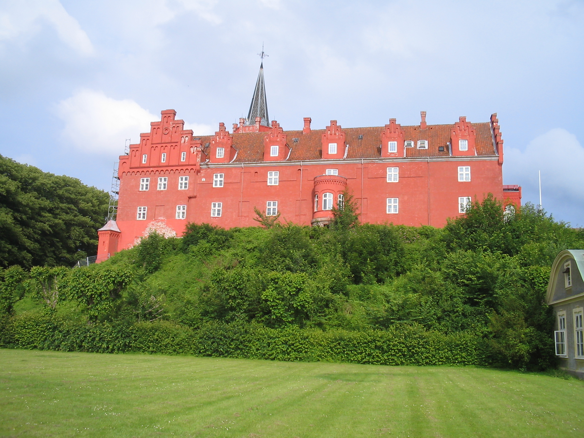 Tranekær Slot on Funen, Denmark